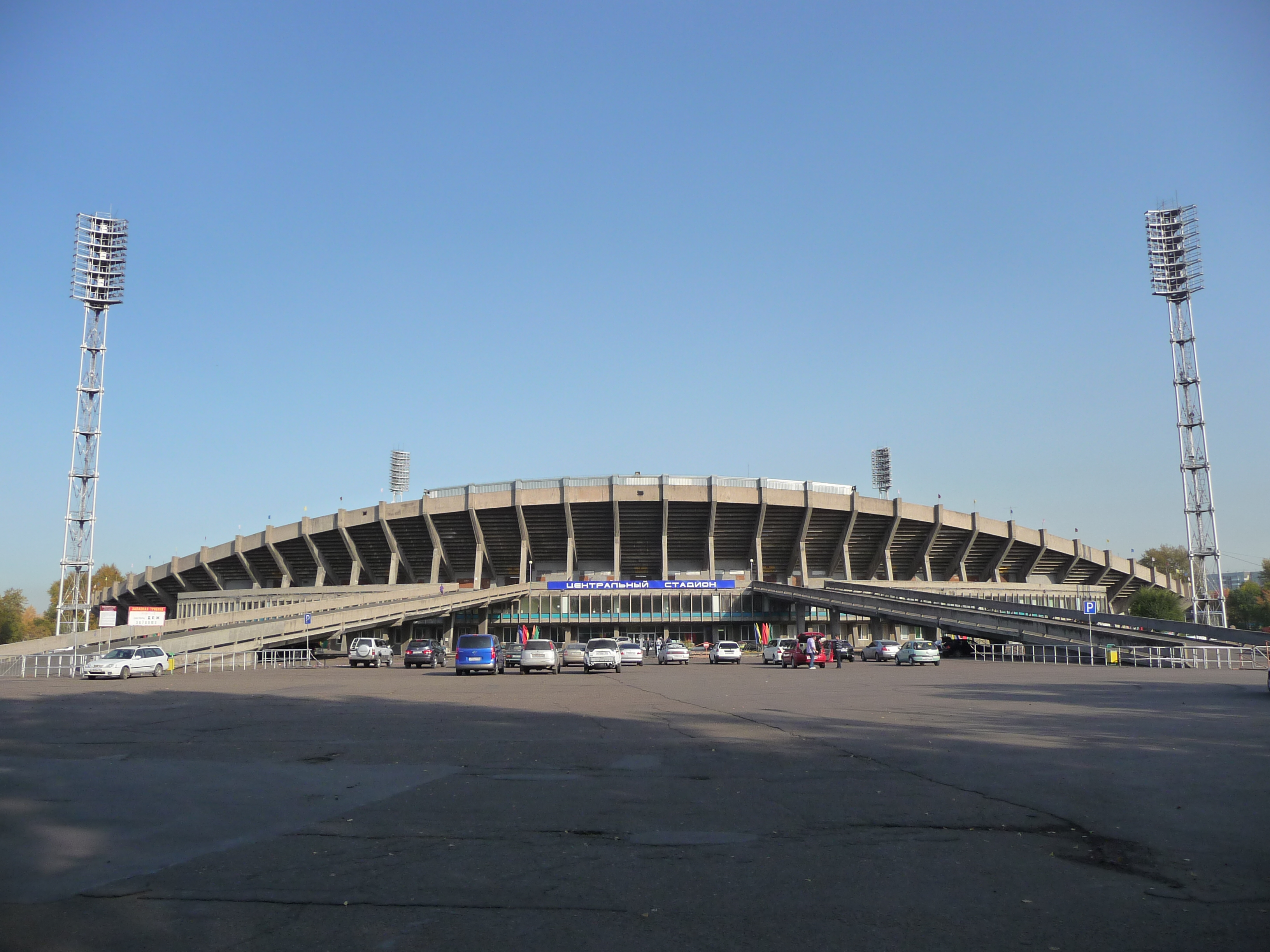 Central Stadium (Krasnoyarsk)